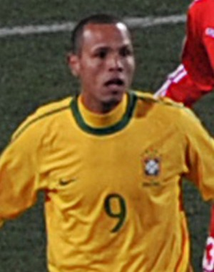 Seleção brasileira estreia na Copa do Mundo de 2010 contra a Coreia do Norte.